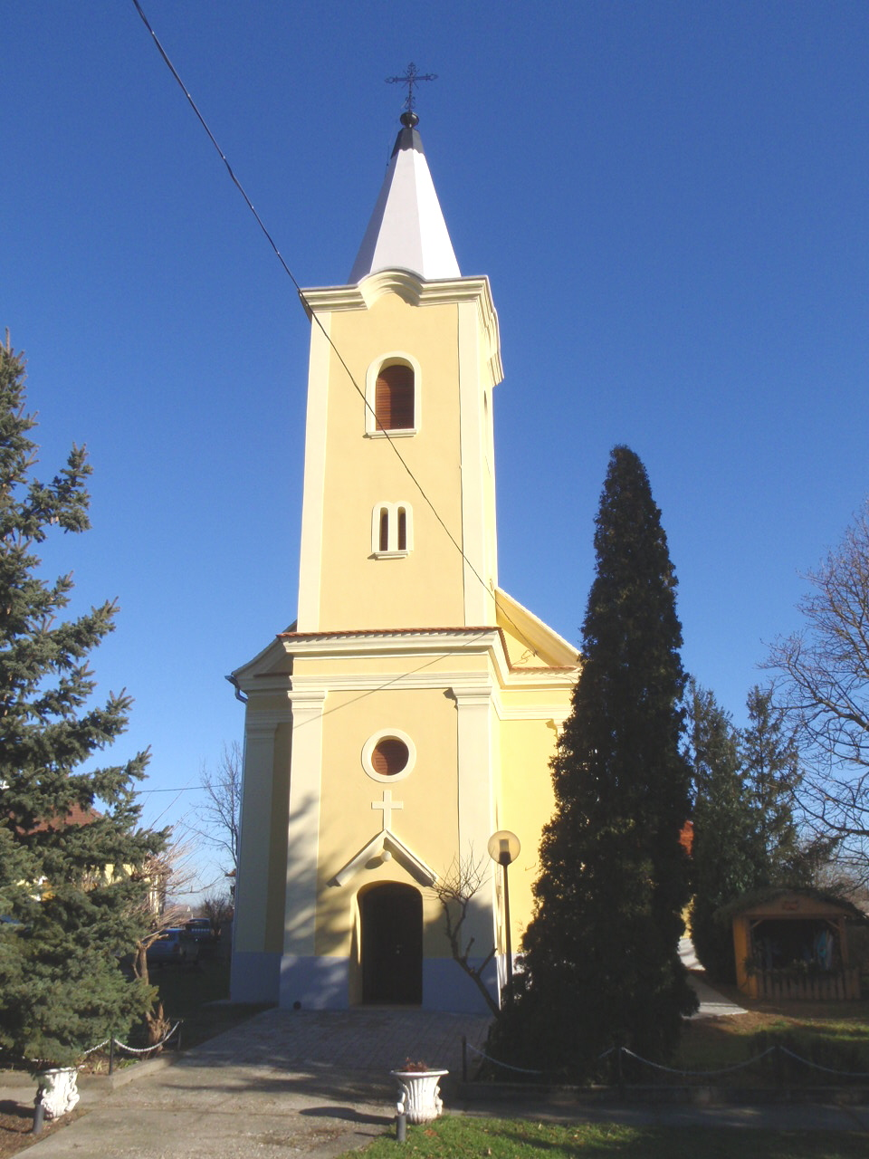 Vát Szent Kozma és Damján templom Fő utca